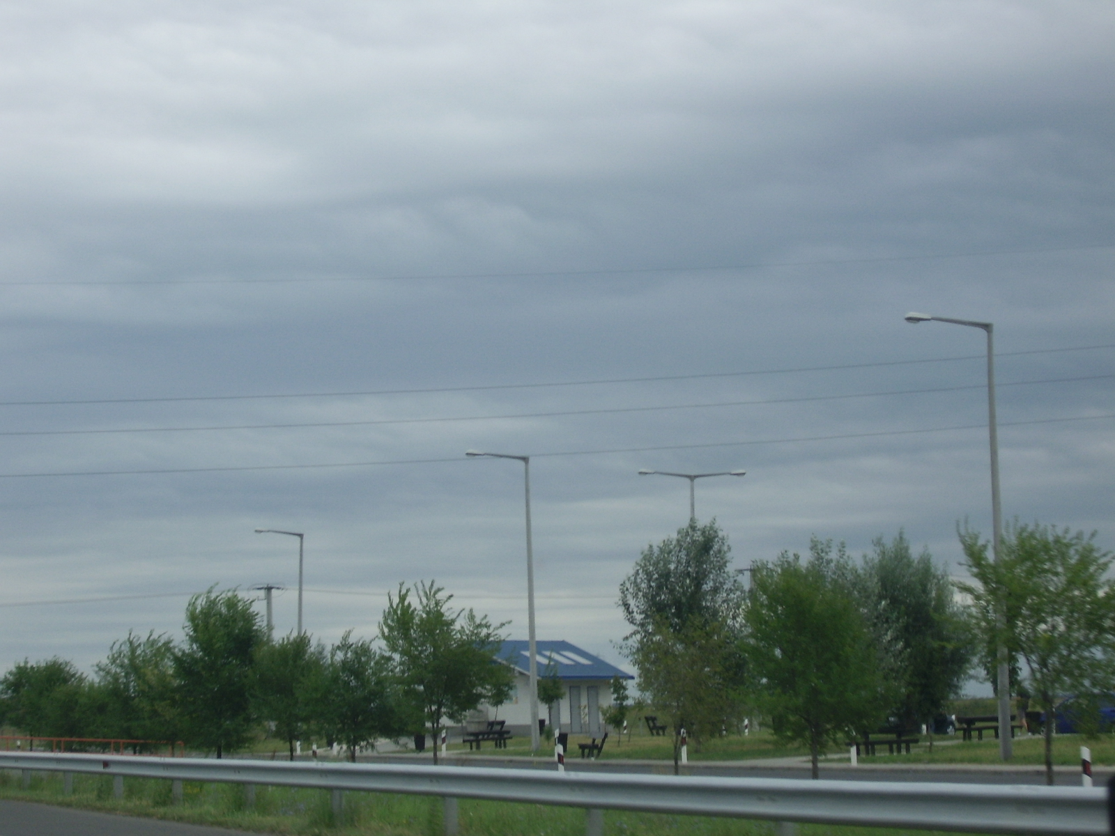 Polgári pihenőhely (M3-as autópálya)